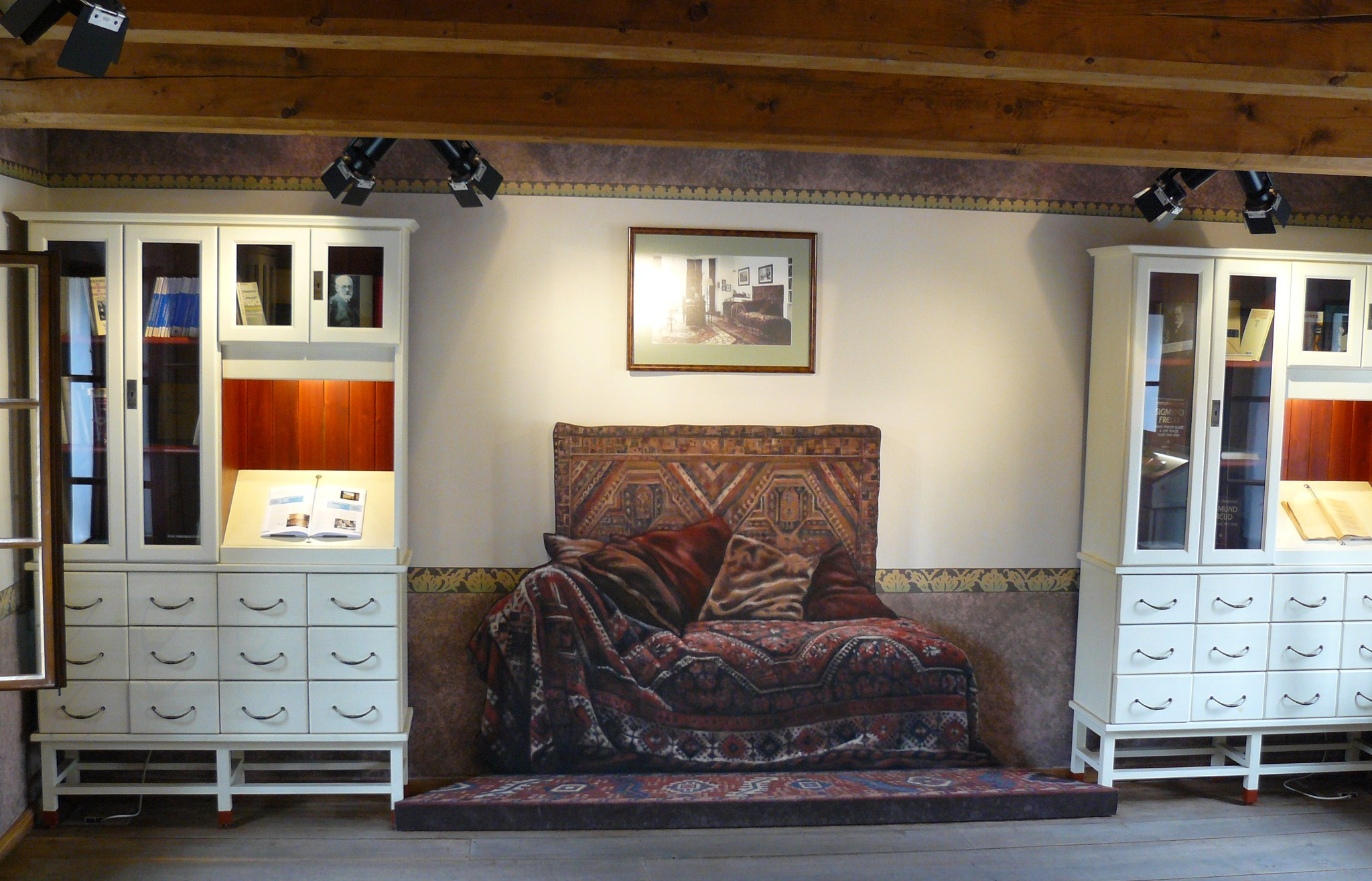 Dom urodzin Zygmunta Freuda w Priborze.